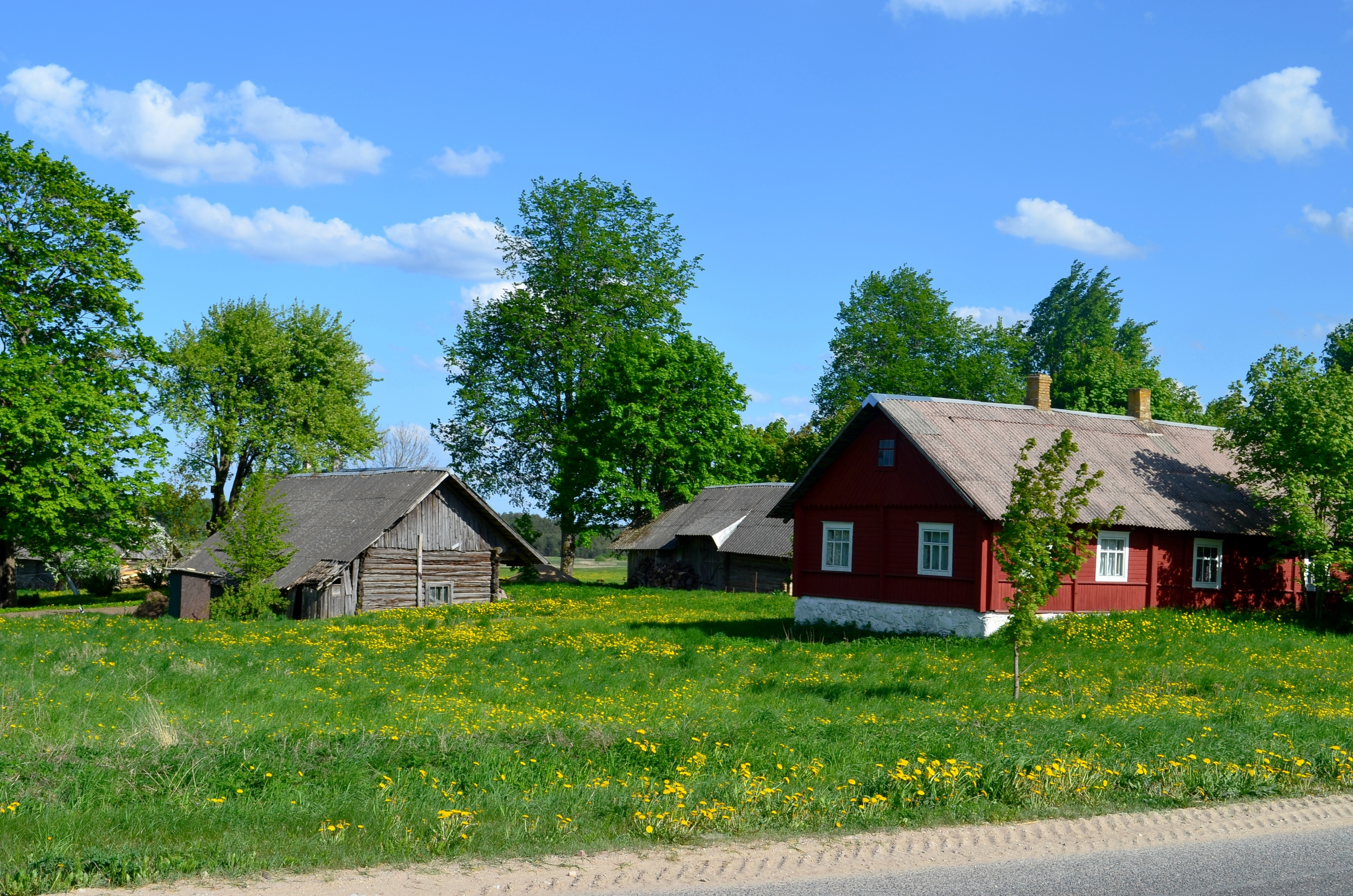 Stebuliškiai, Joniškio sen., Molėtų raj.